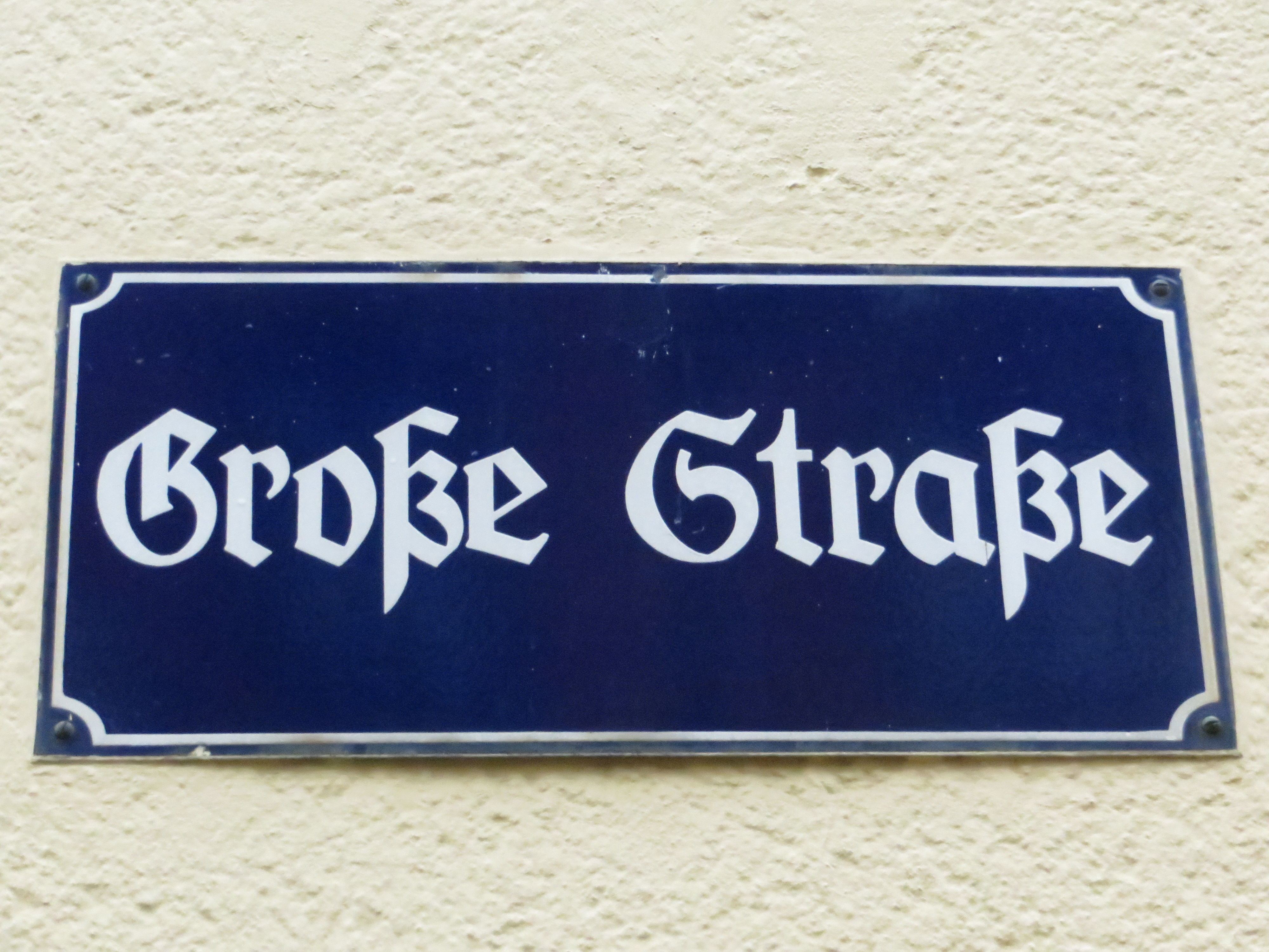 Straßenschild Große Straße, Flensburg, Bild 01